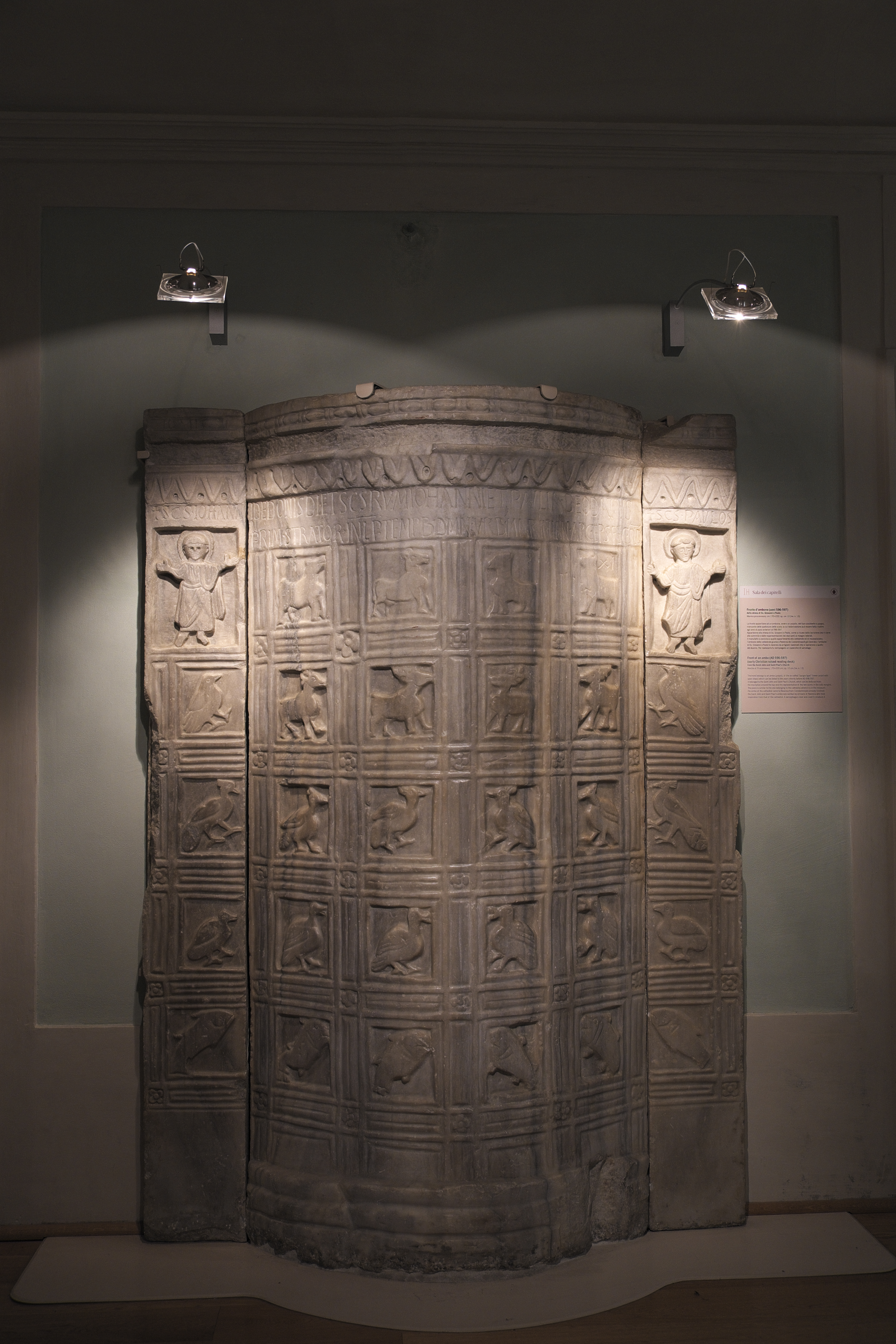 Erzbischöfliches Museum in Ravenna (Emilia-Romagna/Italien), Ambo aus dem 6. Jahrhundert